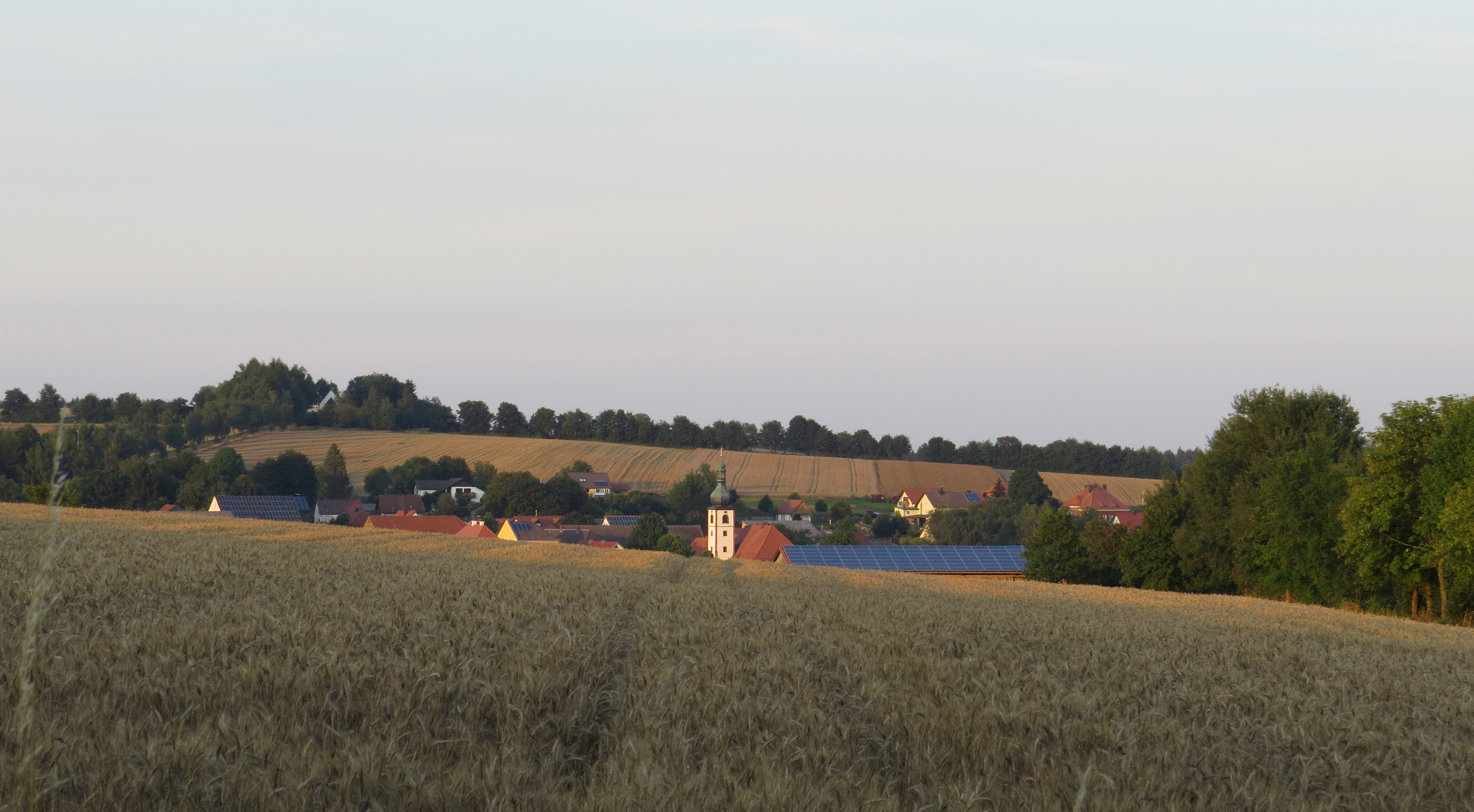 Mähring von Westen